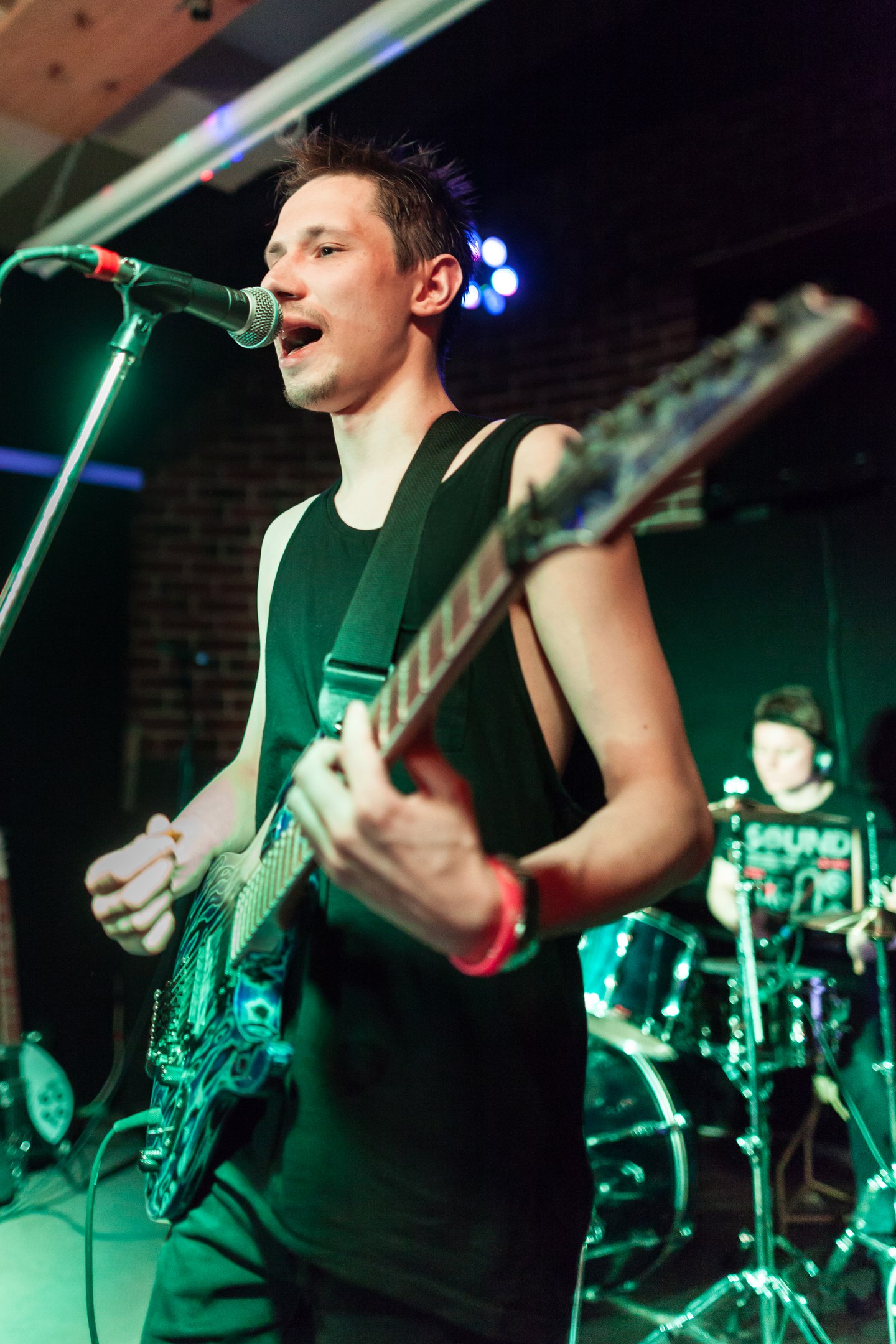 Группа «Серый кит» во время исполнения трека «Я — бомба» в московском клубе «Алиби» (2017 год)